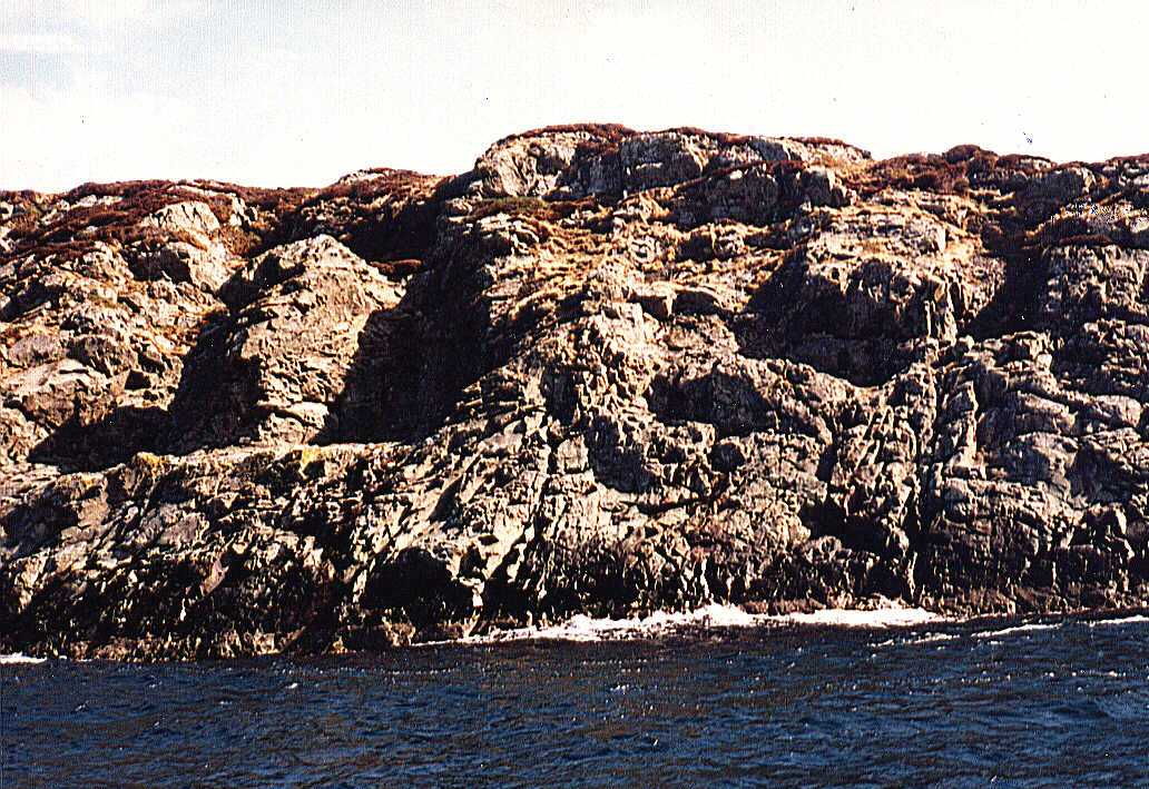 Hespriholmens hovedbrudd sett fra sjøen mot øst